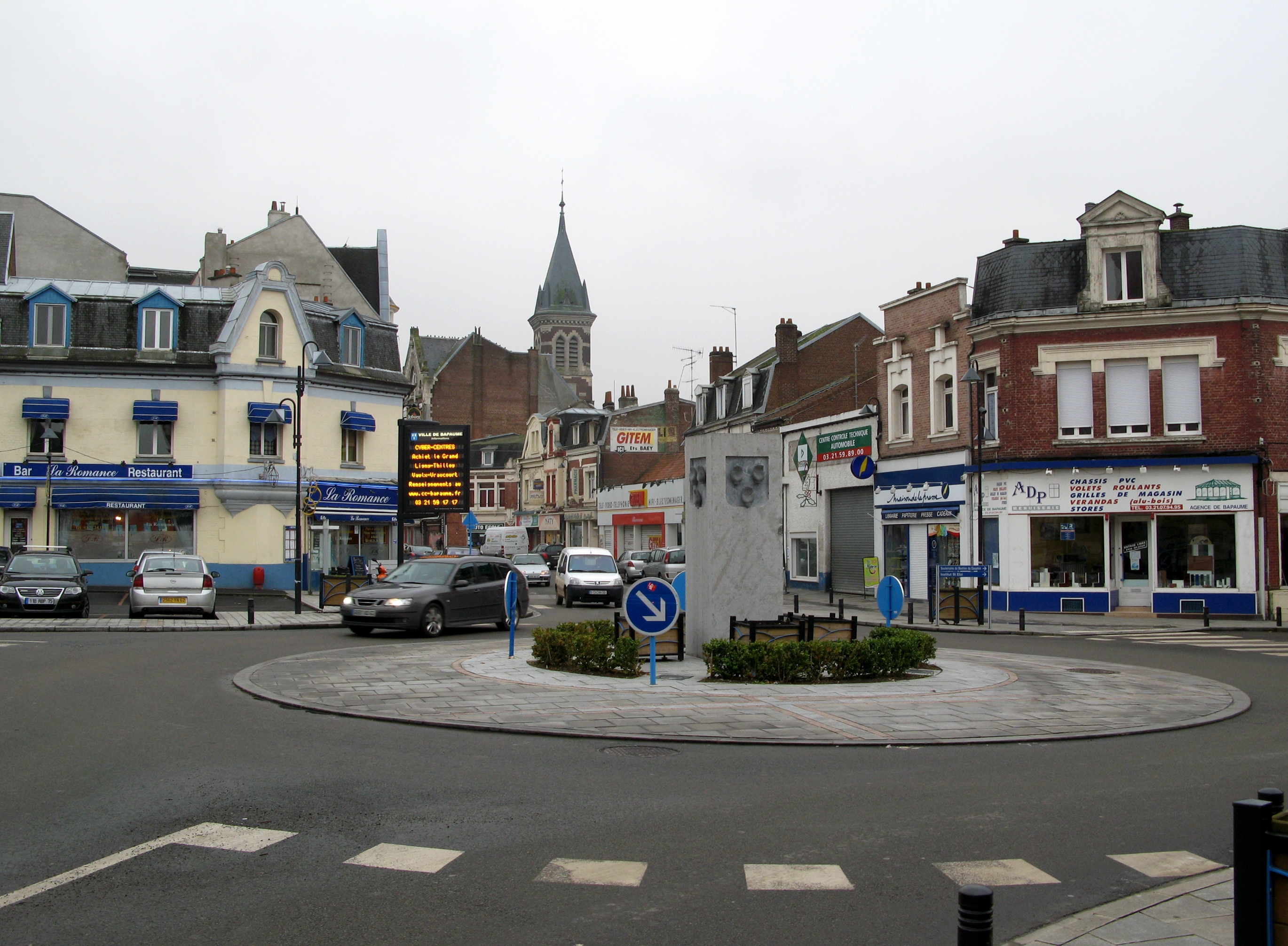 Bapaume (Pas-de-Calais, France) - Le rond-point à proximité de l'hôtel-de-ville. Au centre de ce rond-point, un bloc de pierre à section carrée présente sur chacune de ses faces le blason de la ville. Ce type de bloc décoratif identifiant la commune a été installé à d'autres endroits lors du réaménagement récent du centre-ville. Tout au fond, dans l'axe de la rue devant, se dresse l'église St-Nicolas.